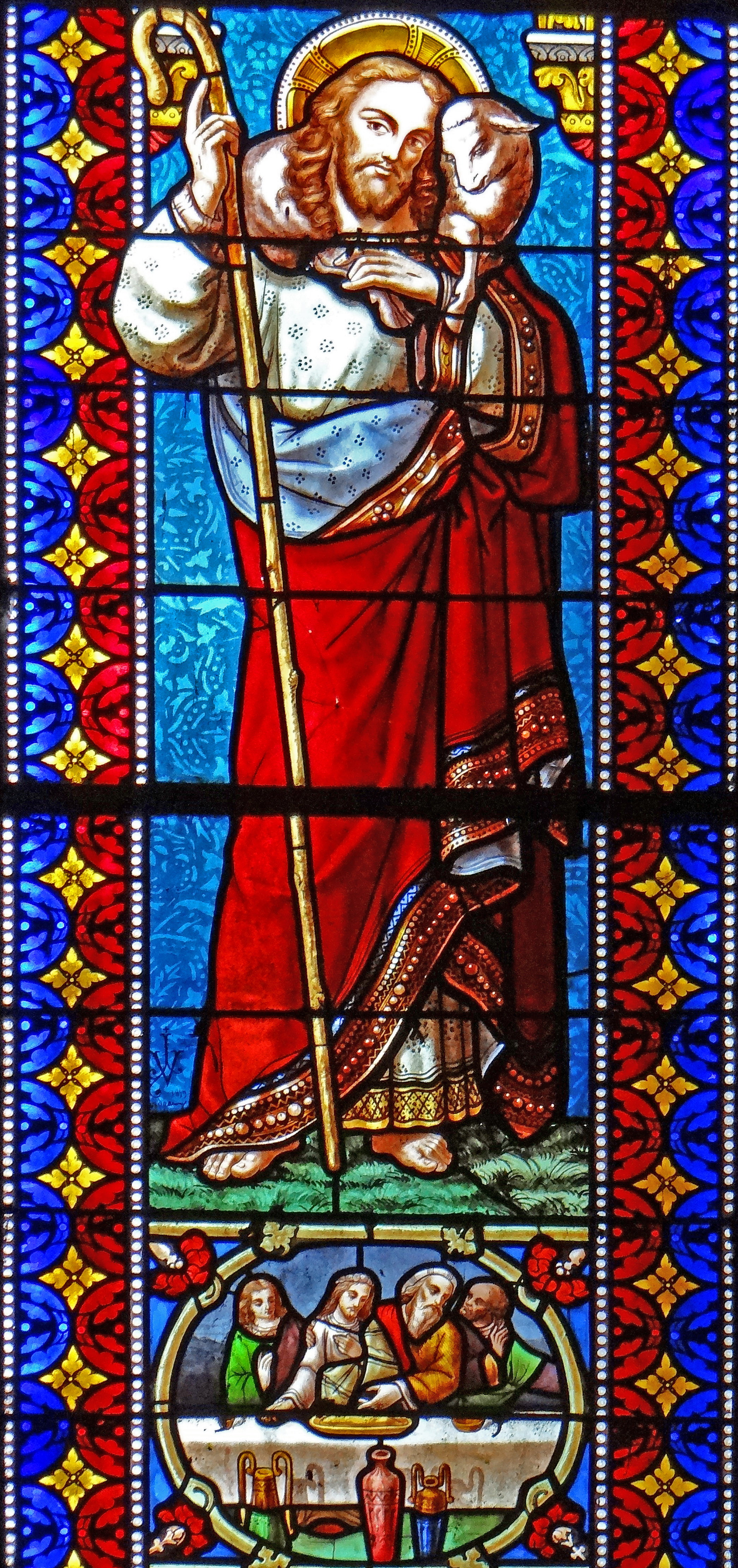 Fongrave - Église Saint-Léger - Vitrail de Joseph Villiet